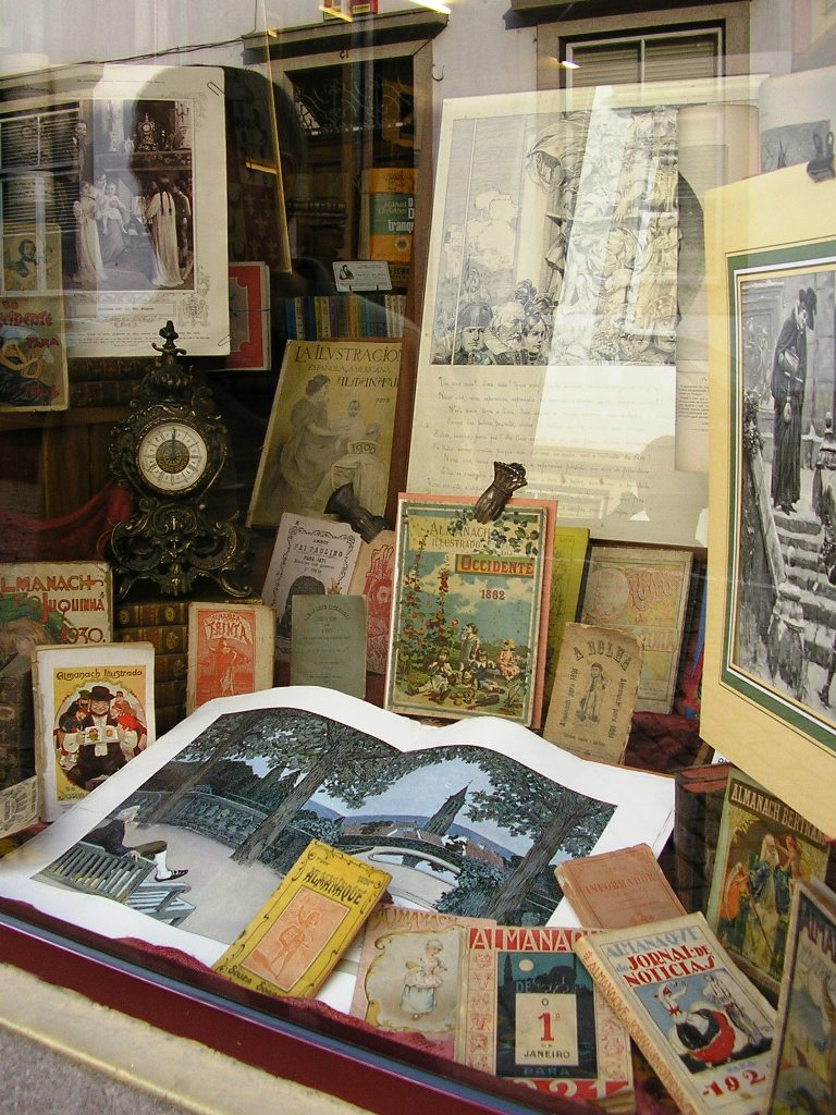 "Chaminé da Mota" bookshop in Porto, Portugal. Author: Manuel de Sousa.